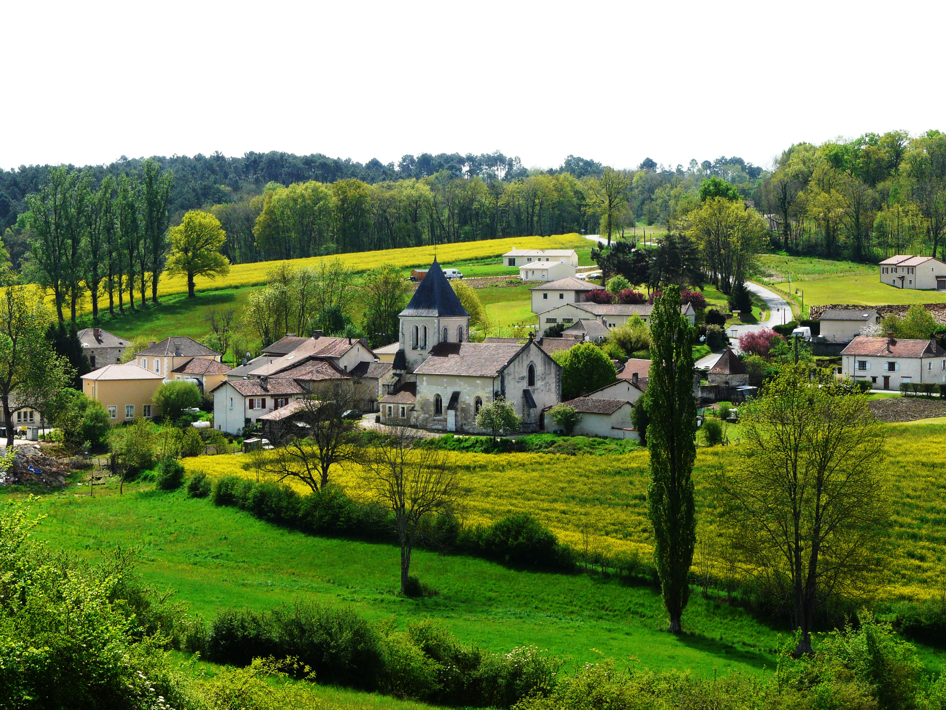 Vue générale de Biras, Dordogne, France